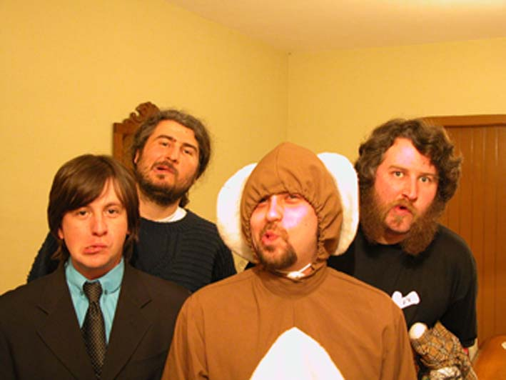 Repolho Vol.3